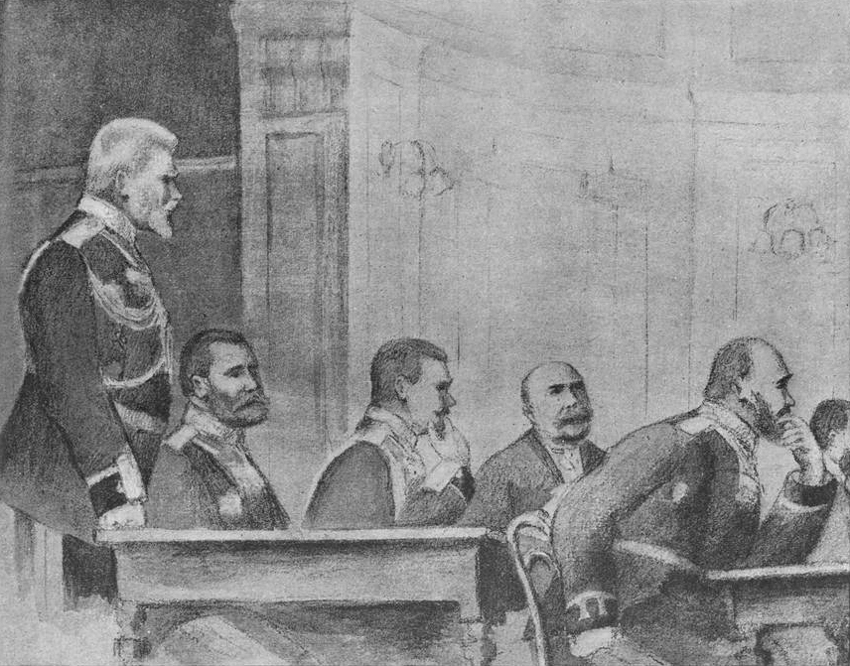 Заседание Верховного военно-уголовного суда по делу о сдаче японцам крепости Порт-Артур. Подсудимые и их защитники. Бывший комендант крепости Порт-Артур ген.-лейт. Смирнов (первый слева), бывший начальник 4-й Вост.-Сиб. стр. дивизии ген.-лейт. Фок, бывший начальник штаба Квантунского укрепленного района ген.-майор Рейс и бывший начальник Квантунского укрепленного района ген.-лейт. Стессель. Перед ним - ген.-лейт. Домбровский, защитник ген. Фока.